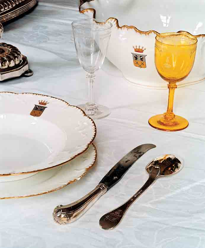 Museum Van Loon, eetkamer